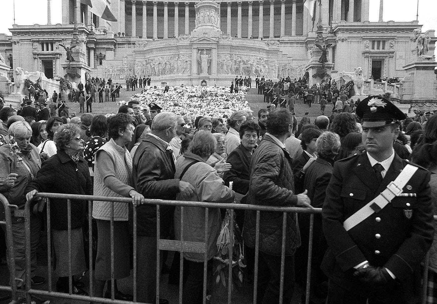 Fila di persone per l'omaggio ai caduti di Nasiriya